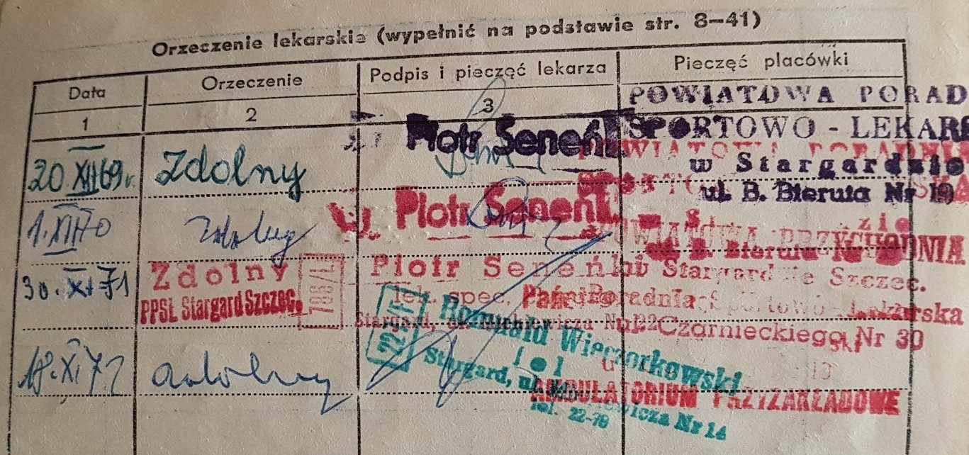 Orzeczenie lekarskie zawodnika